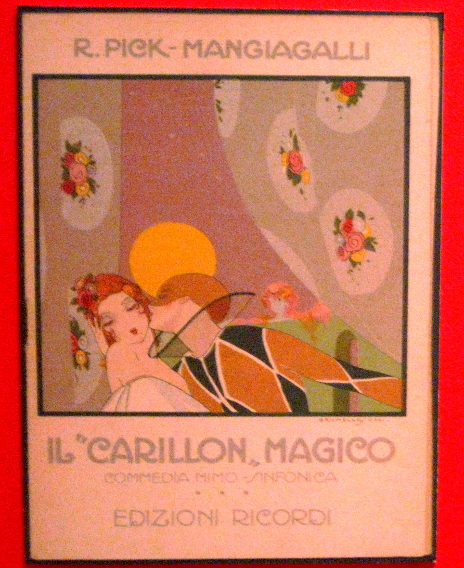 Riccardo Pick-Mangiagalli - Il carillon magico (1919 libretto)